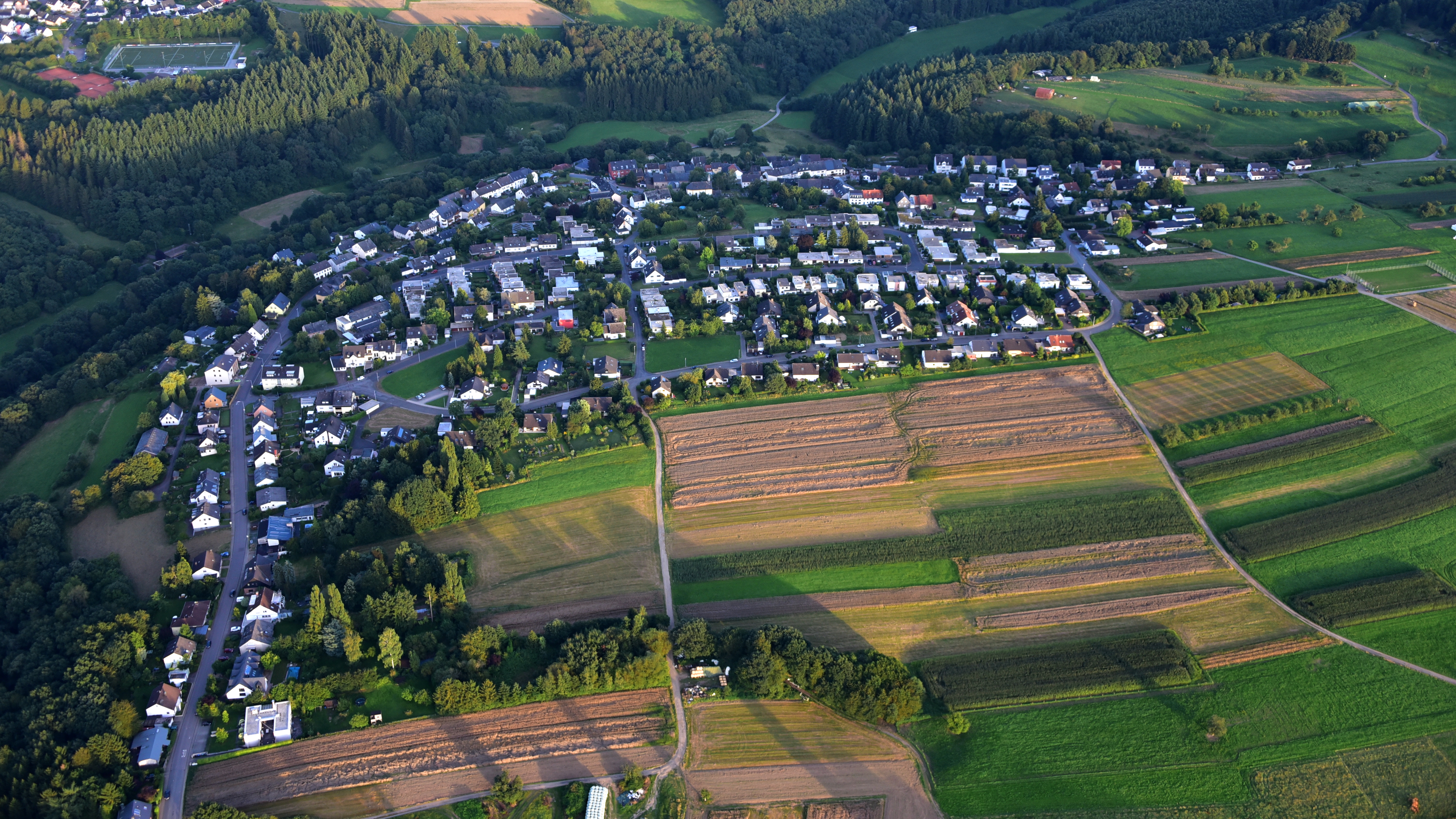 Kernscheid, Luftaufnahme (2016)